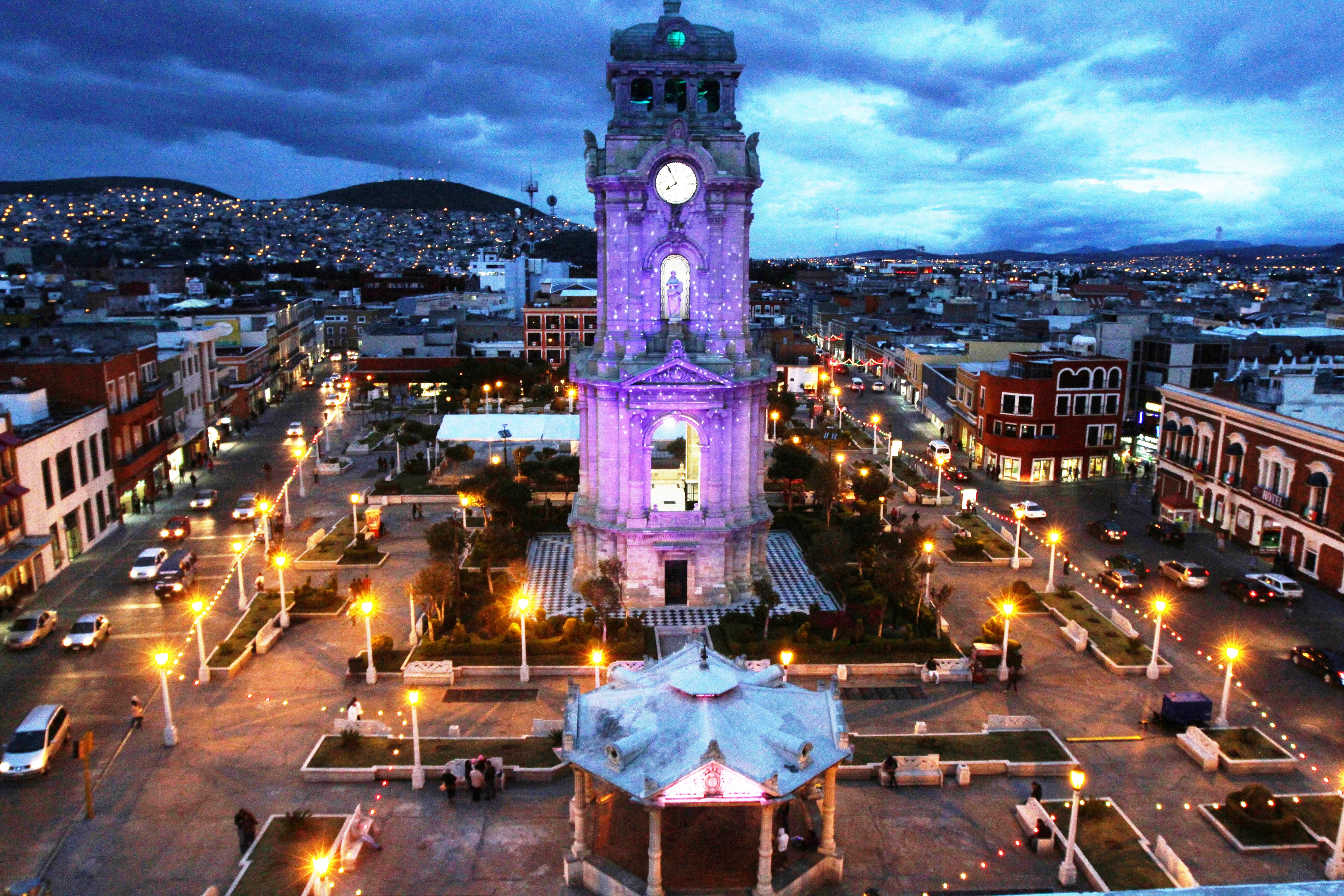 Panorámica del reloj monumental de Pachuca Hidalgo